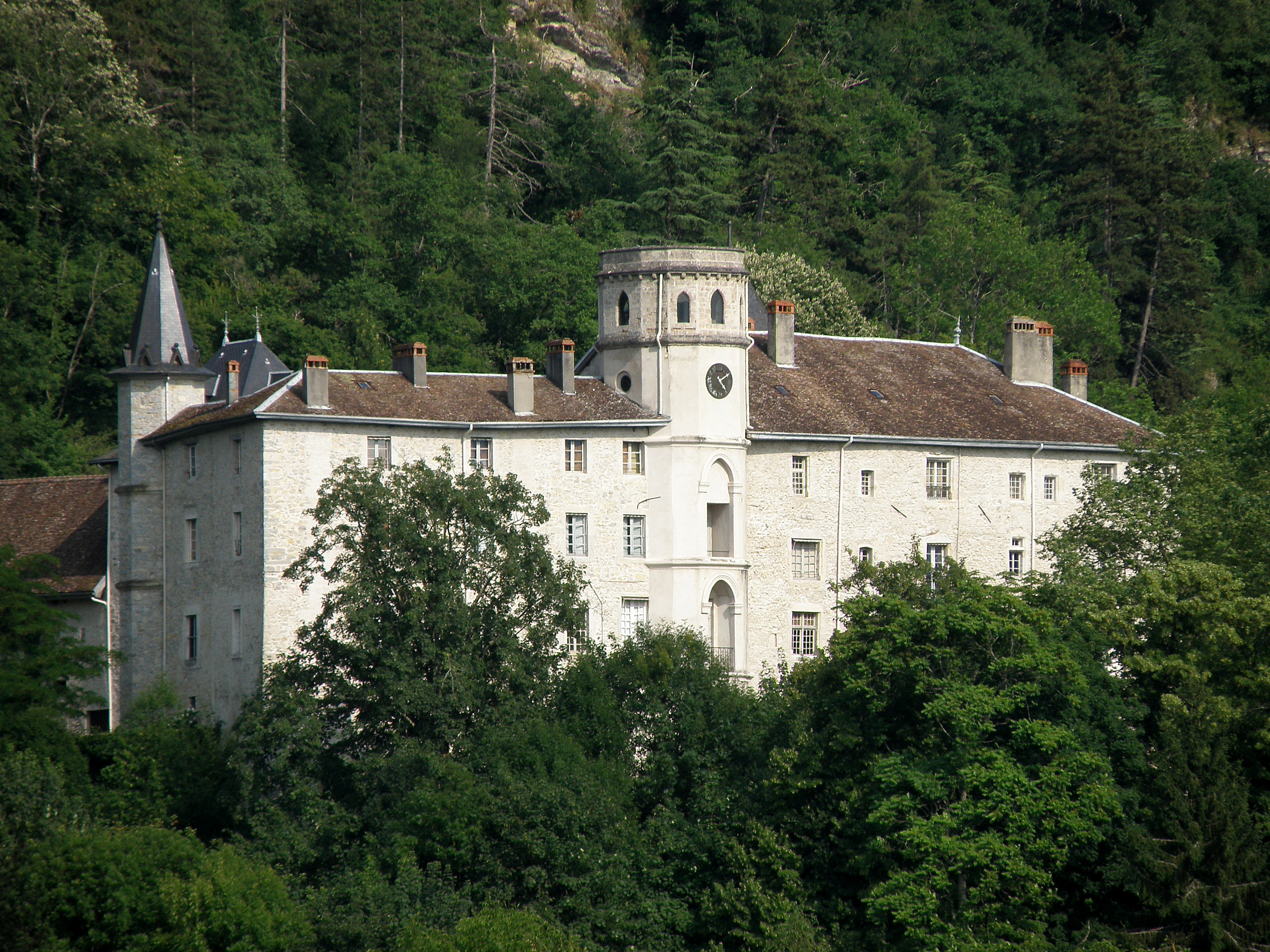 Lucey, comm. du département de la Savoie (région Rhônes-Alpes, France). Château.